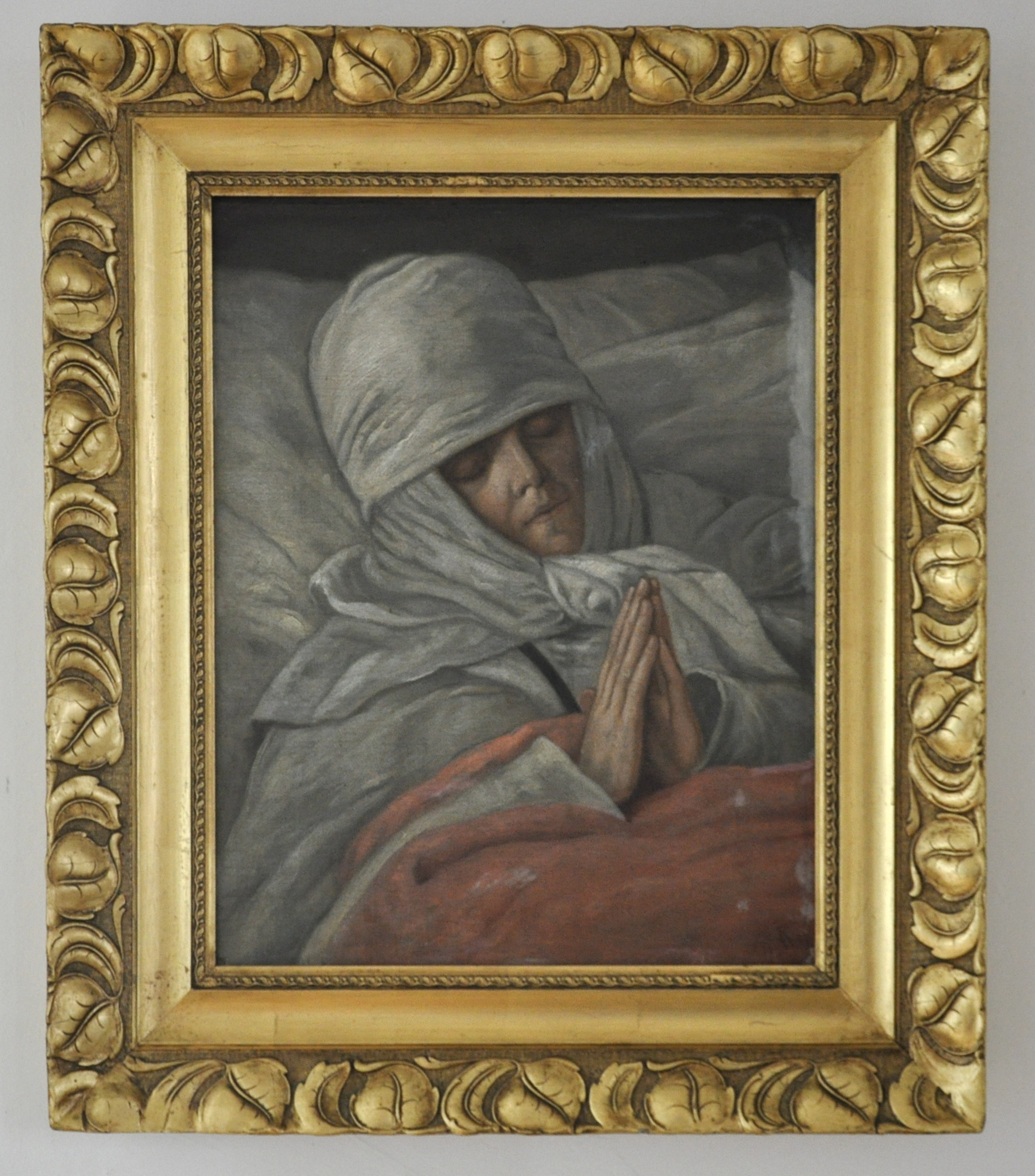 Wolpertswende, Pfarrkirche St. Gangolf, Gemälde: Viktoria Hecht auf dem Krankenbett, Kopie des verschwundenen Originals von Ferdinand Kaltenbacher, nach einem Foto